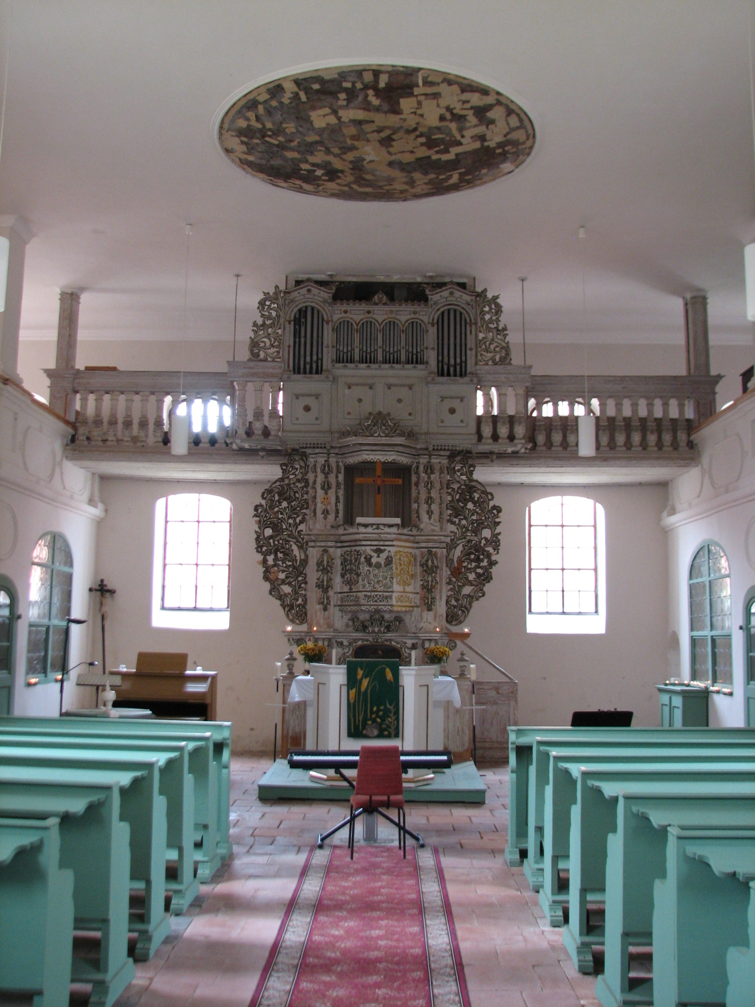 Blick zu Altar, Kanzel und Orgel